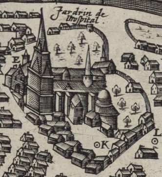 Abbaye de saint Martial sur un plan de Limoges